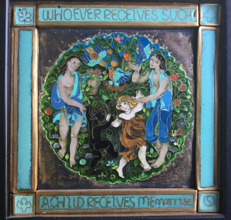 Margarete Seeler: Year of the child. Silber-Cloisonné auf Kupfer. Diese Arbeit wurde von der UNICEF 1979 anlässlich des "Jahr des Kindes" für einen emaillierten Teller verwendet, der in einer auf 3000 Stück limitierten Auflage erschien.